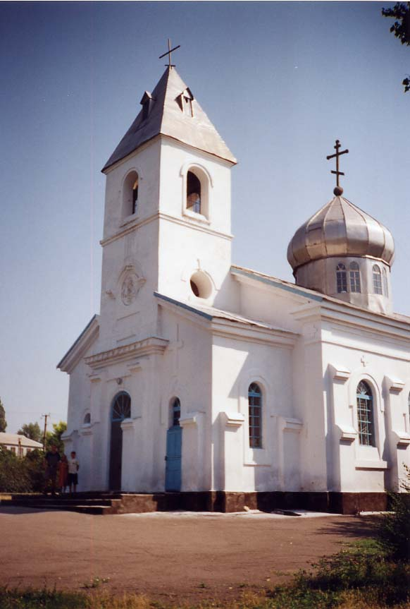 Svenska kyrkan i Gammalsvenskby